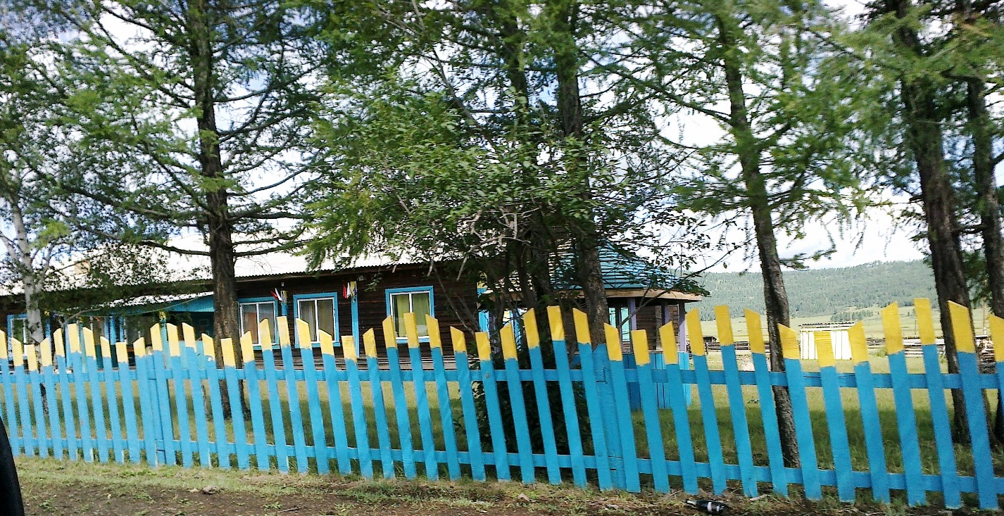 Дом культуры в с.Бортой